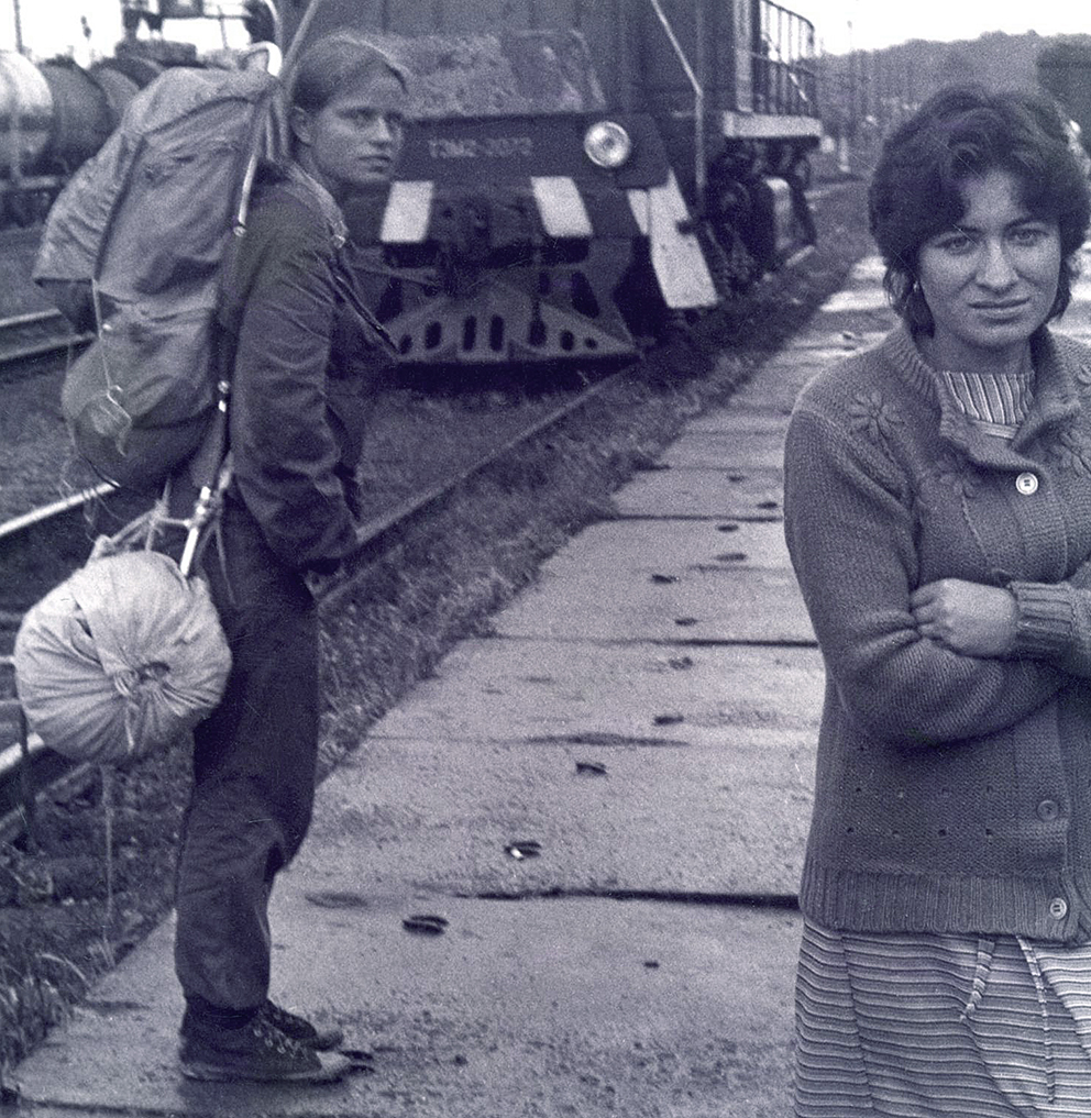 esimese isiknäituse "Kes me oleme, kust me tuleme, kuhu läheme" materjali kogumisel